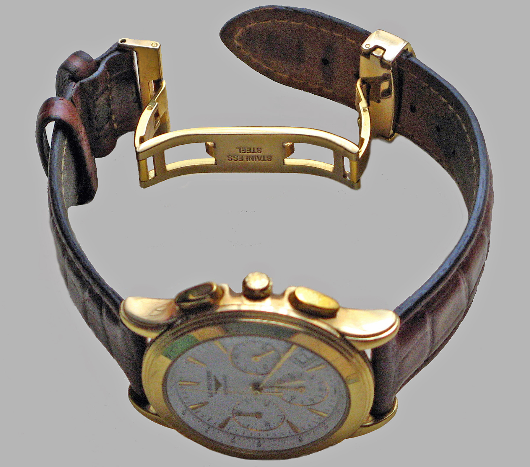 Butterfly-Faltschliese mit Lederarmband